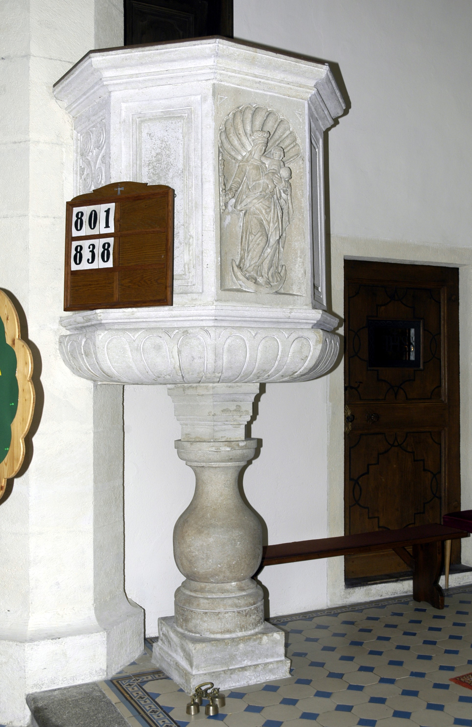 Kanzel in der katholischen Pfarrkirche heiliger Leopold in Niederschleinz aus dem Ende des 18. Jahrhunderts bestehend aus einem polygonalen Korb mit einem Relief Maria Immaculata auf einem Balustersockel.